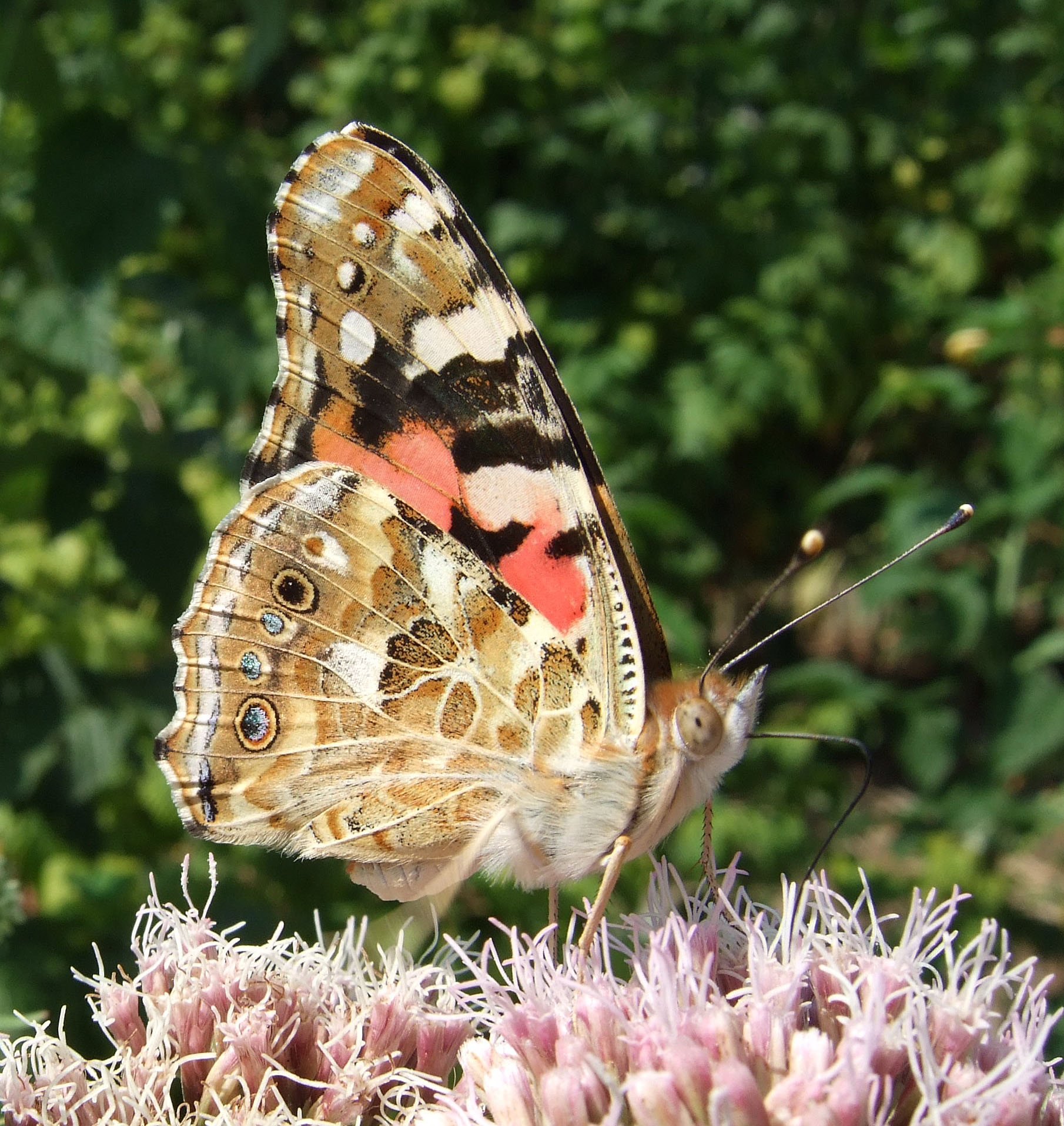 Distelfalter (Vanessa cardui) auf Wasserdost